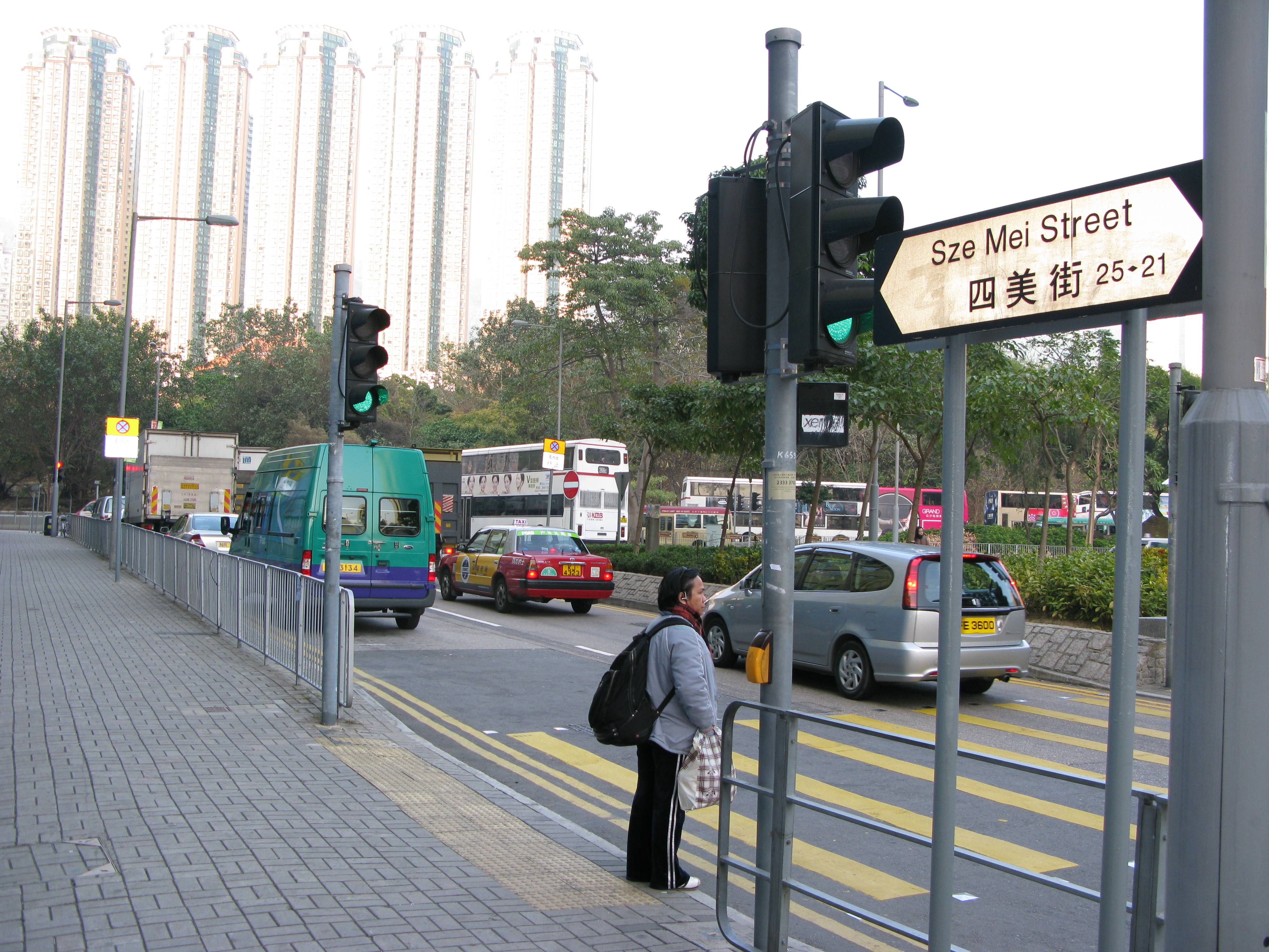 中文（香港）: 香港九龍新蒲崗四美街